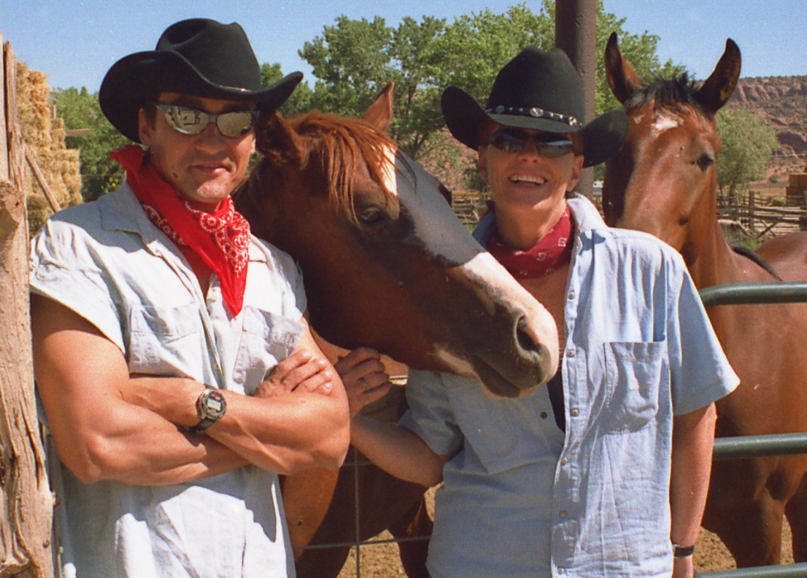 Mariusz Max Kolonko i Kasia Dowbor na planie Odkrywania Ameryki jko Łowcy Mustangów.